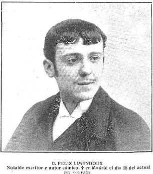 Retrato del escritor y dramturgo español Félix Limendoux, obra del fotógrafo Manuel Compañy, en la revista Nuevo Mundo.